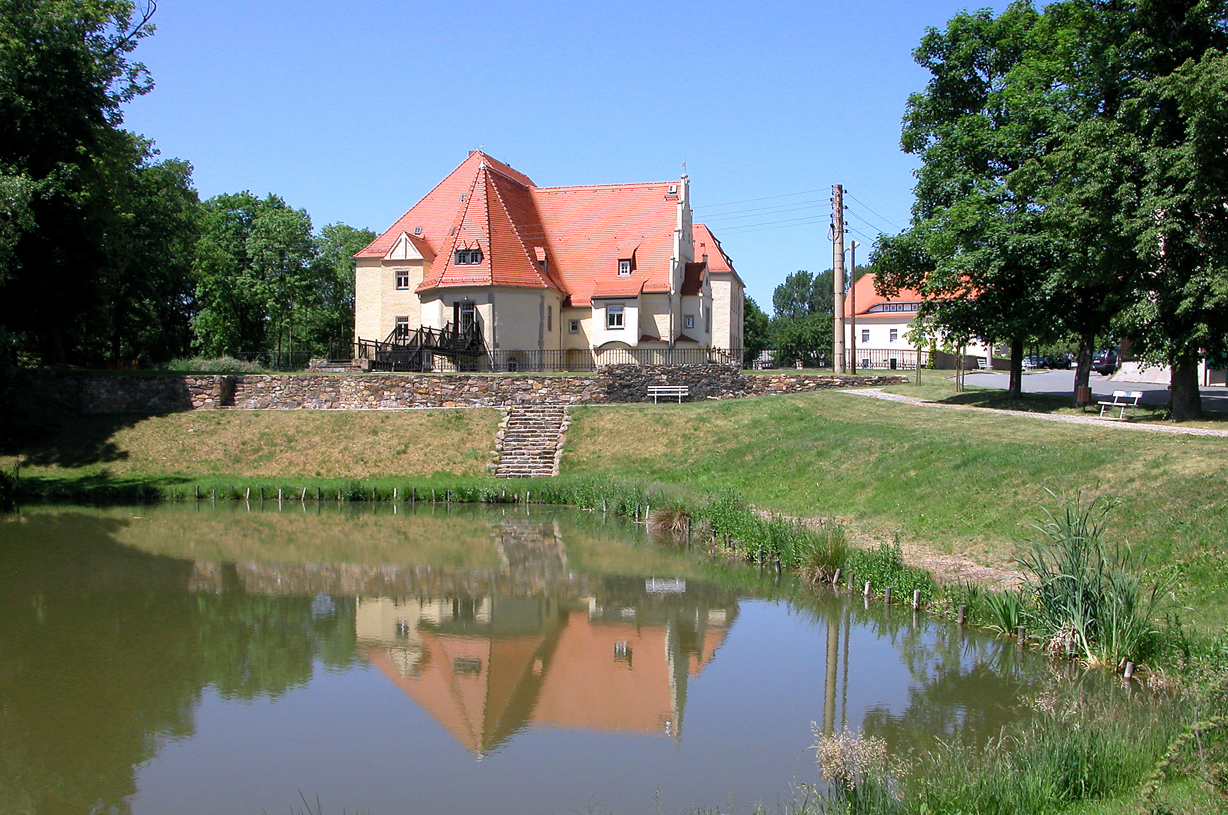 30.05.2003 01623 Schleinitz (Nossen): Aus mittelalterlicher Wasserburg hervorgegangenes Schloß. [DSCN]20030530040DR.JPG(c)Blobelt